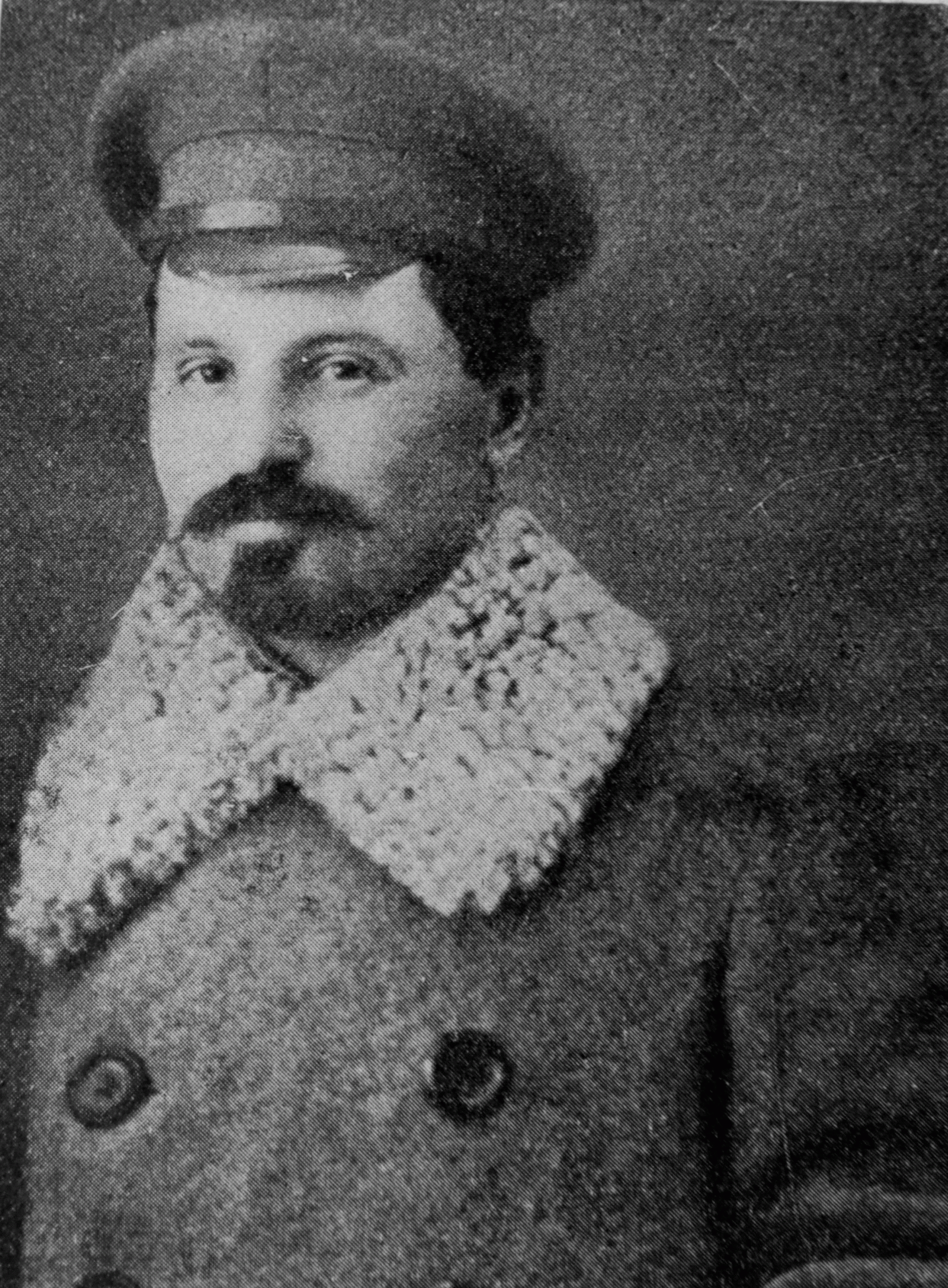 Jiří Klecanda se narodil 5. dubna 1890 v Praze jako nejmladší ze tří synů českého učitele, spisovatele a novináře Jana Klecandy (* 1855 - 1920). (Jedním z jeho bratrů byl historik Vladimír Klecanda (*1888 - 1946); druhým z jeho bratrů byl diplomat Jan Havlasa (* 1883 - 1964) - vlastním jménem Jan Klecanda - český spisovatel, autor dobrodružných a fantastických příběhů.) Jiří Klecanda působil od roku 1909 jako knihovník carské akademie věd v Petrohradě a zárověň jako funkcionář českých krajanských spolků. V československém revolučním hnutí na Rusi pracoval od začátku první světové války jako jeden z hlavních organizátorů československého zahraničního odboje v Rusku. Byl členem první "Rady Čechů" na Rusi. Od roku 1915 působil jako (historicky první) sekretář (tajemník) "Svazu československých spolků" ("Svazu českých spolků") na Rusi. Od roku 1917 zastával funkci (historicky prvního) tajemníka (sekretáře) "Odbočky Československé Národní Rady" v Rusku. Jiří Klecanda je též znám jako důvěrník Tomáše Garrigue Masaryka. V letech 1917 až 1918 vedl se sovětskou vládou jednání o evakuaci československých legií. Dne 28. dubna 1918 na své cestě k legiím na Sibiř náhle zemřel v jihosibiřském městě Omsk.